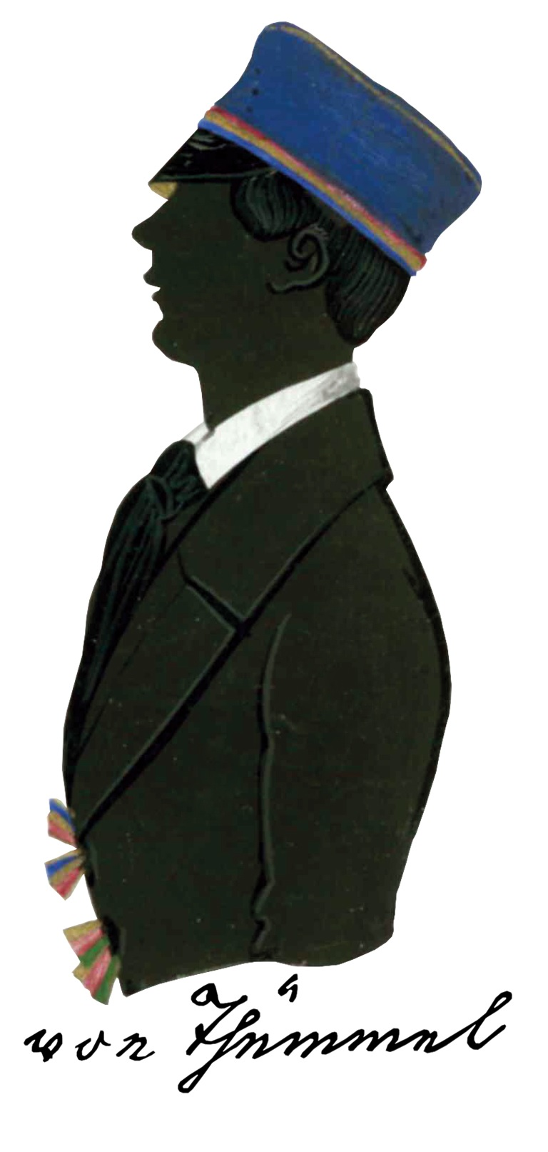 Schattenriss des Studenten Hans von Thümmel